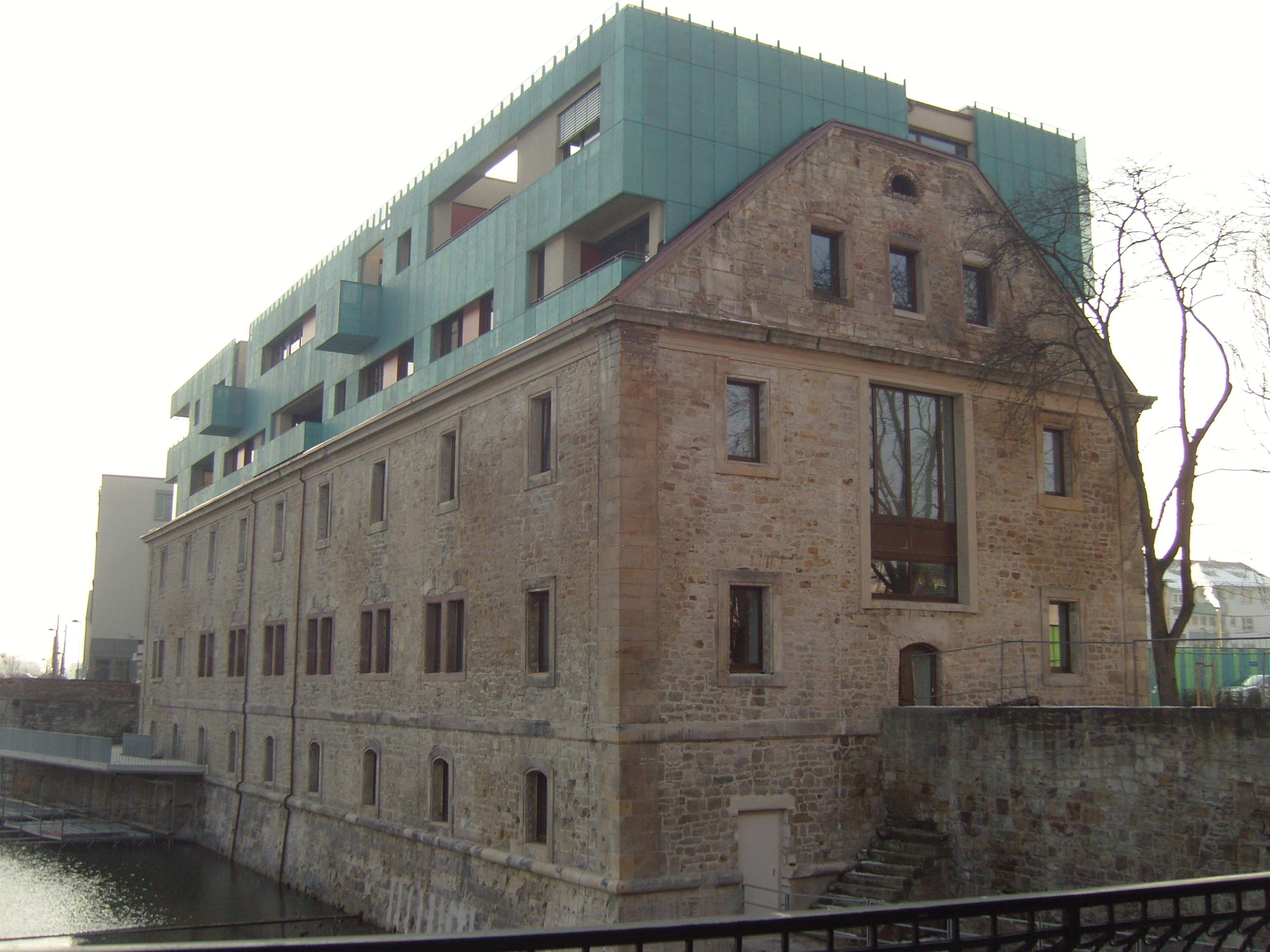 Das Karlshopital in Kassel vom Finkenherd gesehen